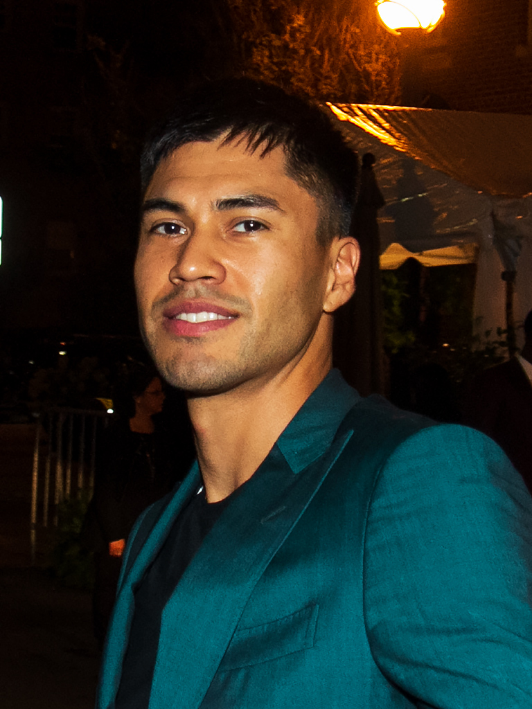 Toronto International Film Festival 2016